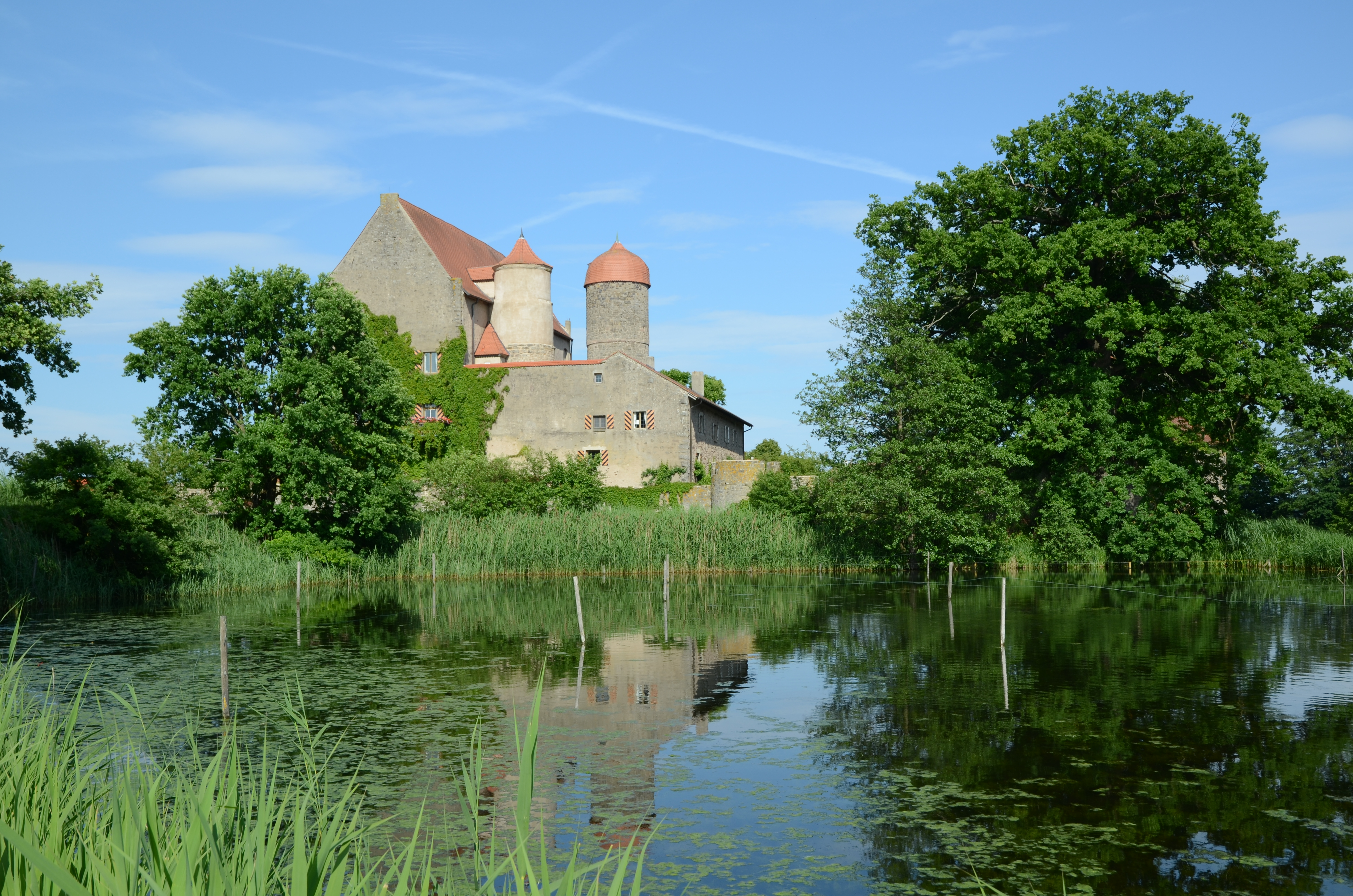 Schloss SommersdorfThis is a photograph of an architectural monument.